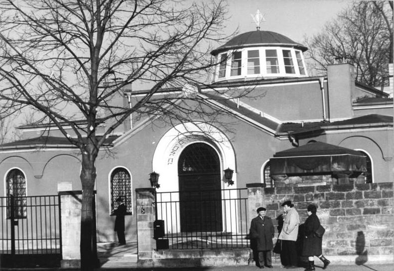 Dresden, Synagoge ADN-ZB Häßler 5.11.1988 Dresden: Die Synagoge der Jüdischen Gemeinde in Dresden wurde wieder geweiht. Aus diesem Anlaß fand ein Gottesdienst statt.